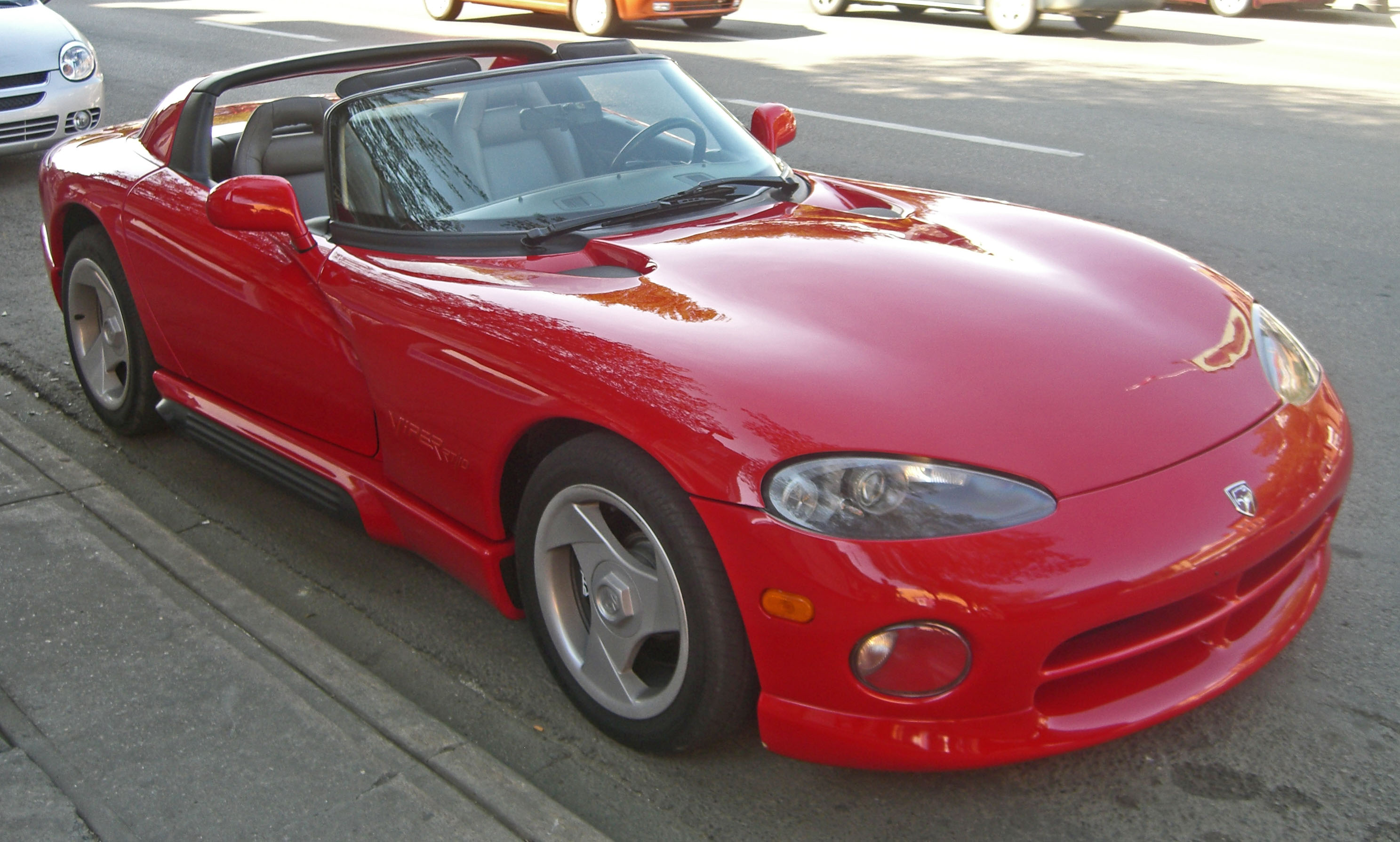 Sujet:DOD VIP RT 10 Source:Fotograf Myke Waddy, Sept 2006 Commons ëmgebaut vum